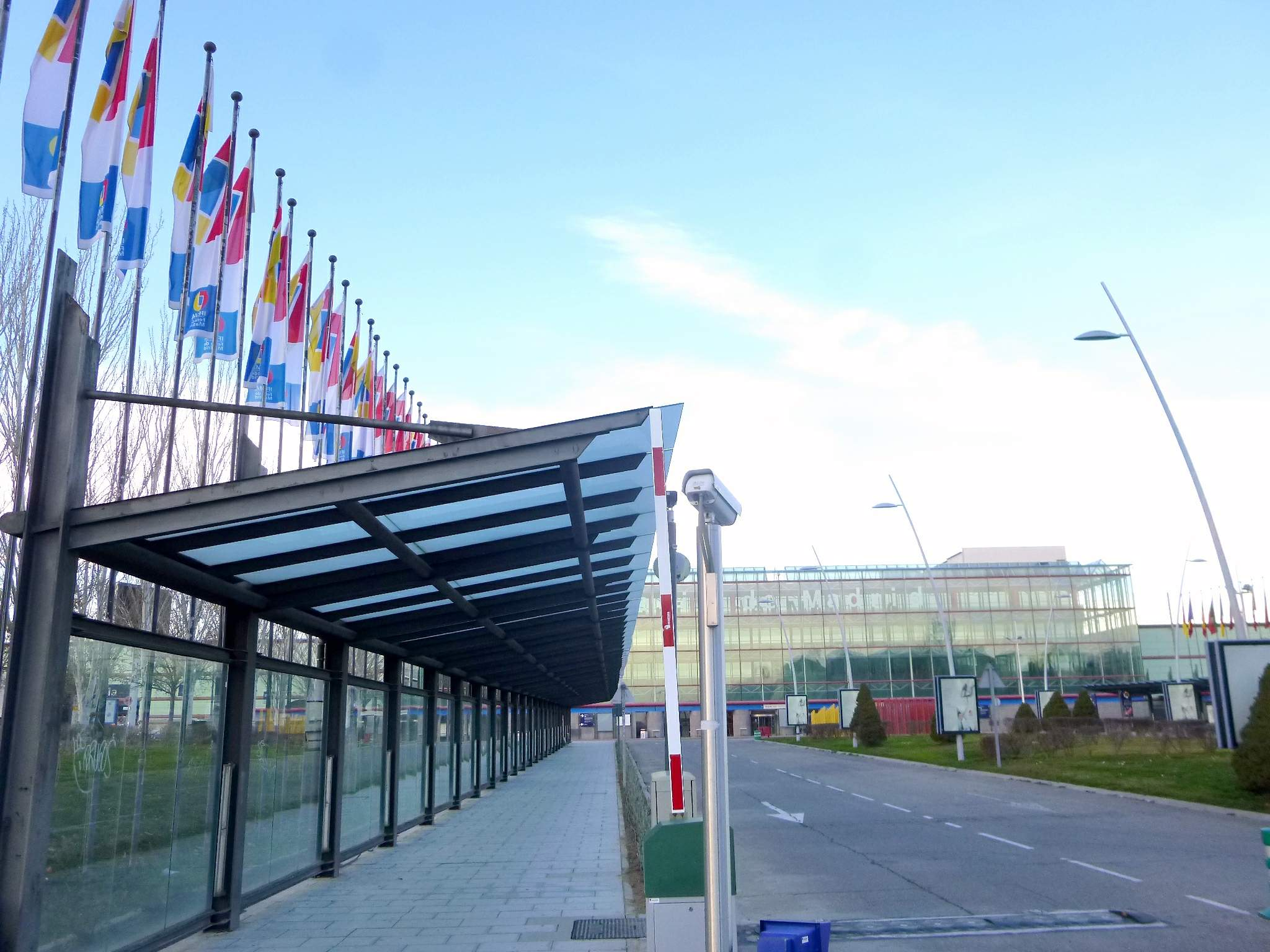 Feria de Madrid (IFEMA)